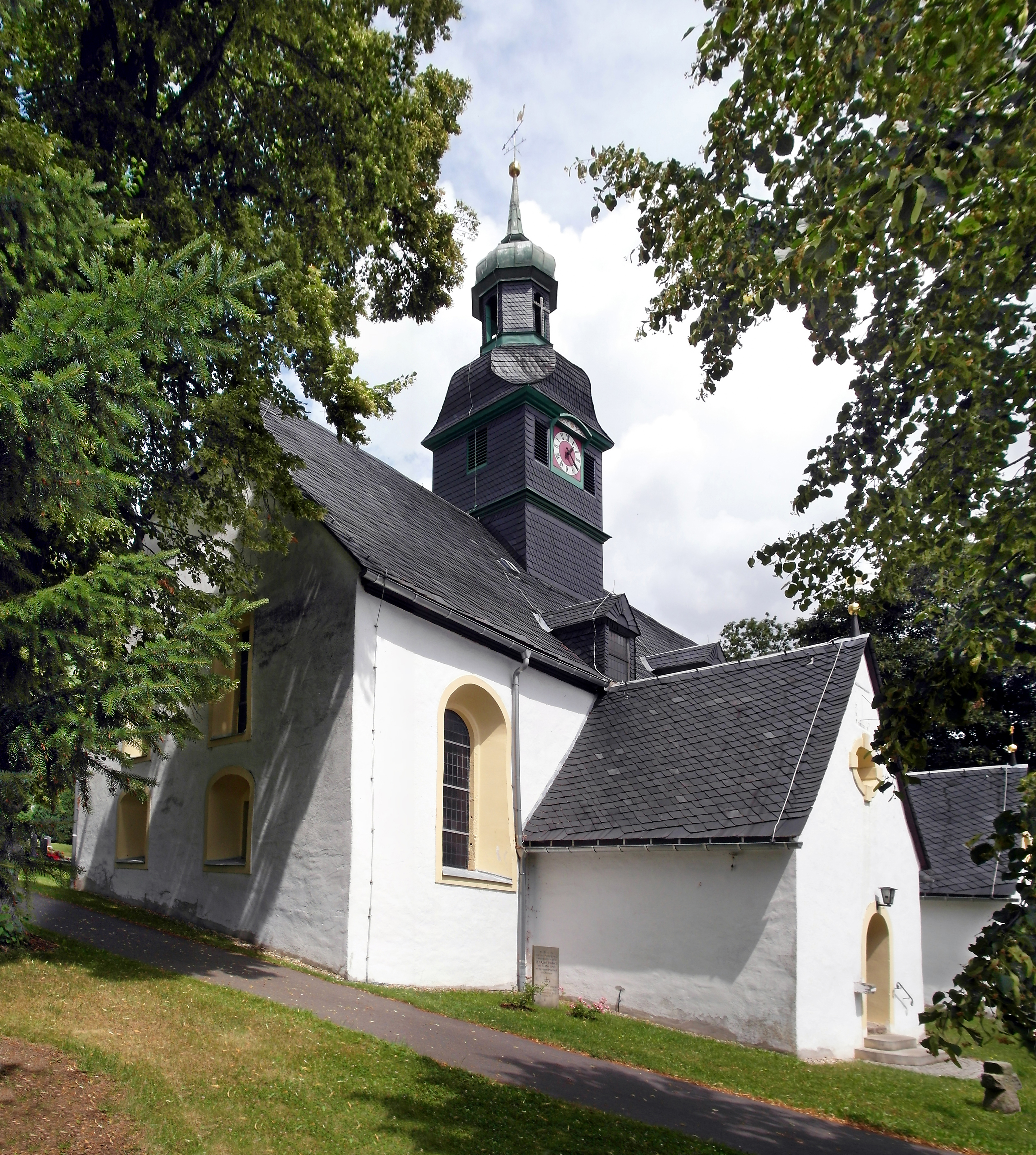 11.07.2018 09619 Helbigsdorf (Mulda): Evangelische Dorfkirche, Hauptstraße (GMP: 50.811503,13.365515). Spätgotik aus dem 14./15. Jahrhundert, 1576 und 1726 erweitert. Die Turmuhr geht auf das Jahr 1580 zurück. Überwiegend barocke Ausstattung. Sicht von Südwesten. [SAM6682+6683.JPG]20180711310MDR.JPG(c)Blobelt